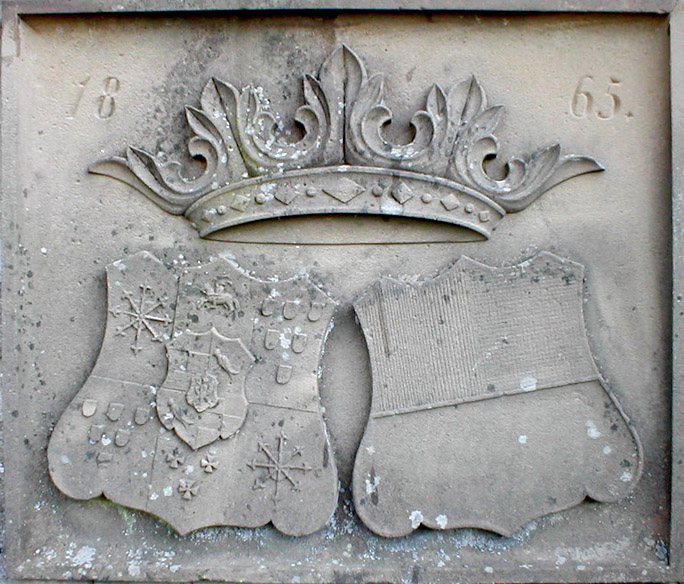 Wappen Degenfeld-Schomburg von 1865 an der Grablege der Familie in Gemmingen-Stebbach.